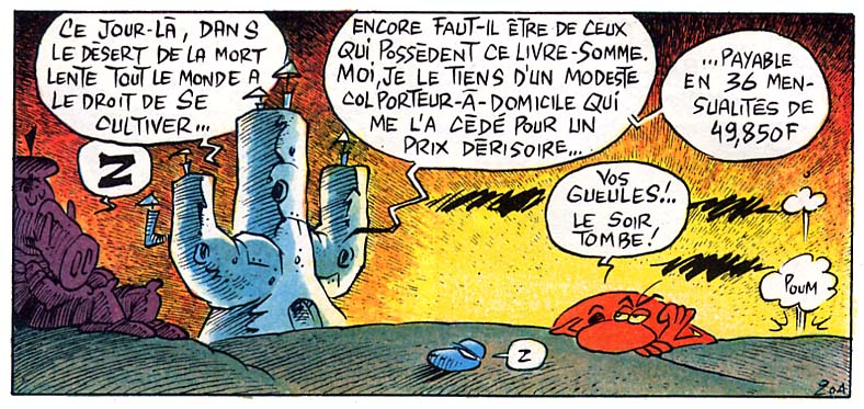 Image 5, page 21 de l'histoire : " Cultur Day ! " tirée de "La Vie Quotidienne du Concombre Masqué." Le cactus-blockhaus, demeure du Concombre.